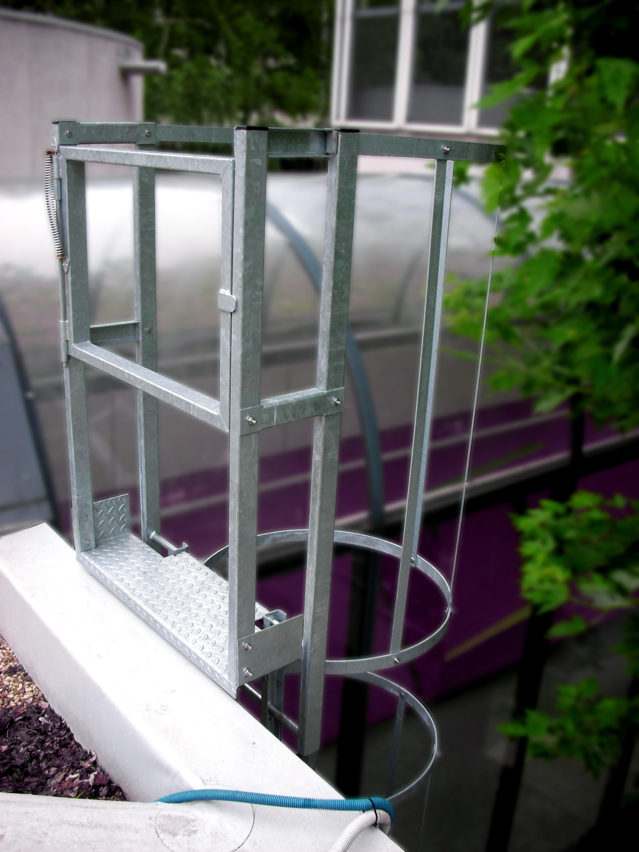 échelle crinoline en acier avec marche palière